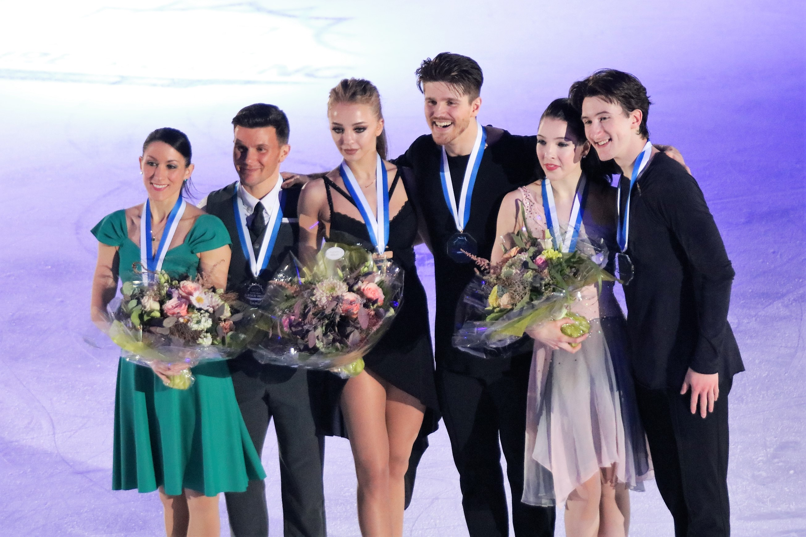 Церемония награждения в танцах на льду на Гран-при Хельсинки 2018.